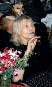 Prise de vue de Akarova faite avec un appareil photo digital Olympus, à son domicile avenue de l'Hippodrome à Ixelles. J'ai trouvé qu'elle était tellement belle que je l'ai ajoutée sur wikipédia!